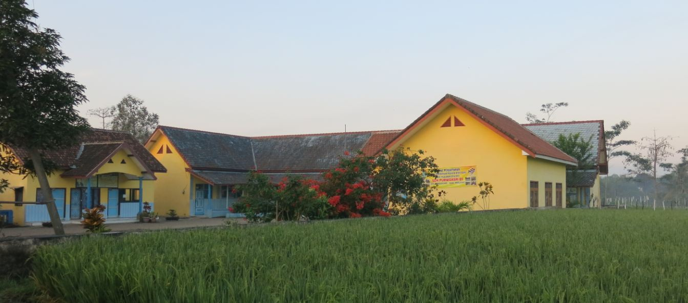 SD Negeri 01 Purwoasri, Singosari berada di tepi Dusun Gebyak.